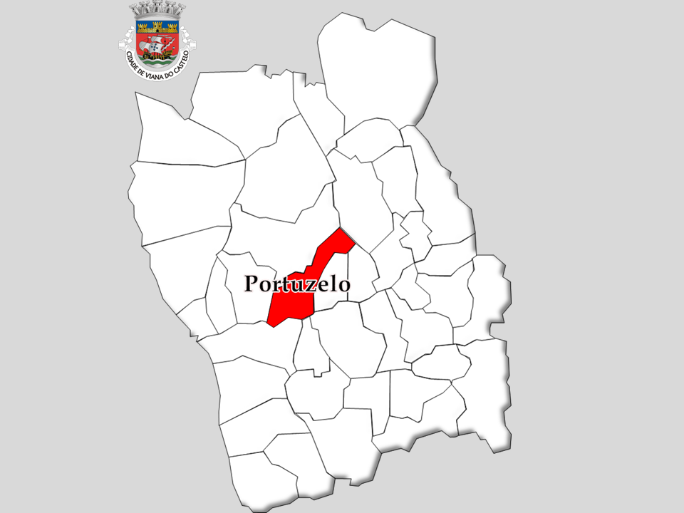 Censos 1864/2011